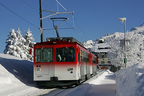 Rigi Staffel: Zugkomposition der Vitznau-Rigi-Bahn VRB